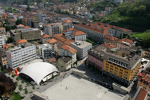 Piazza del Sole, Posta, Stazione (Bellinzona)